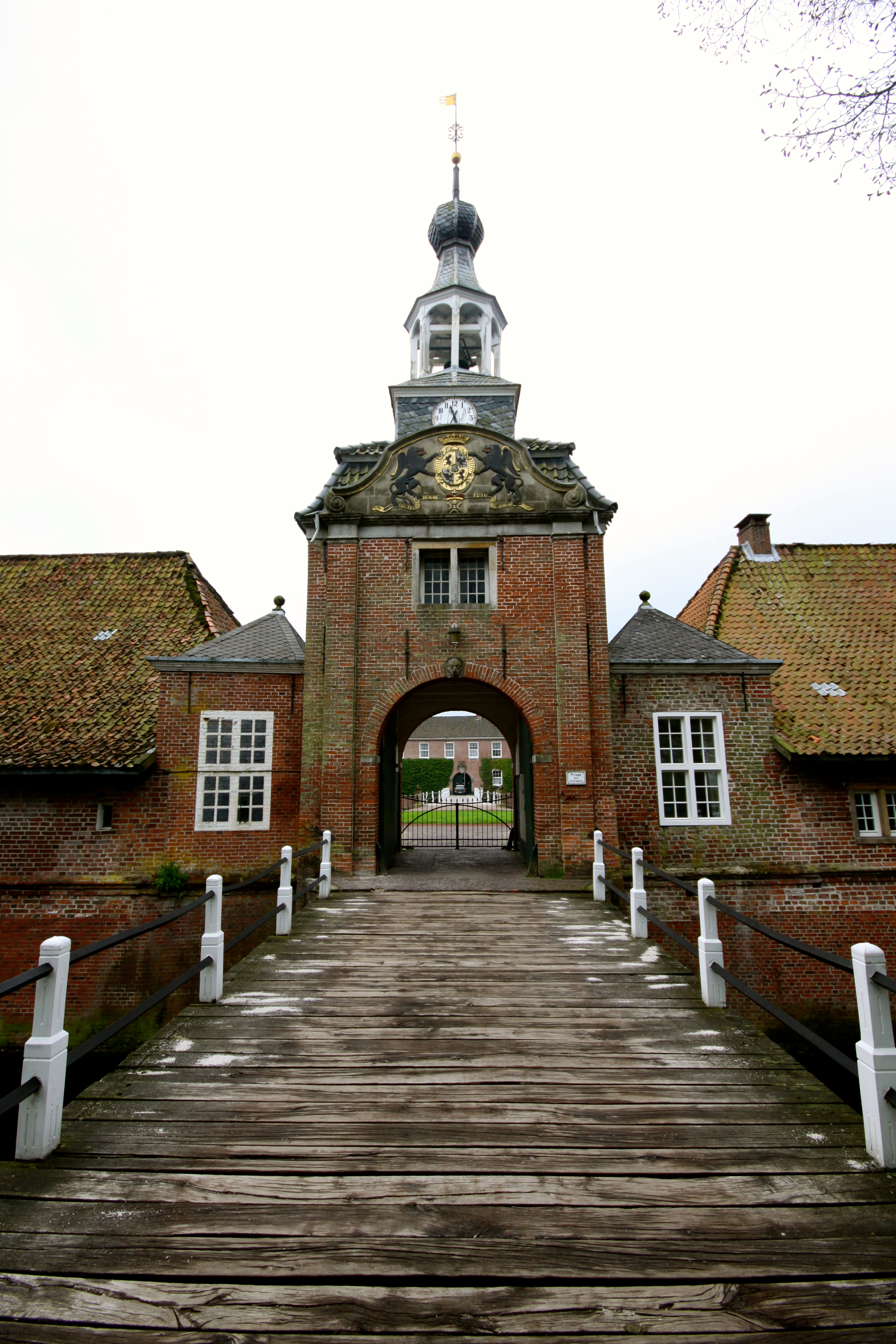 Schloss Lütetsburg - Vorburg